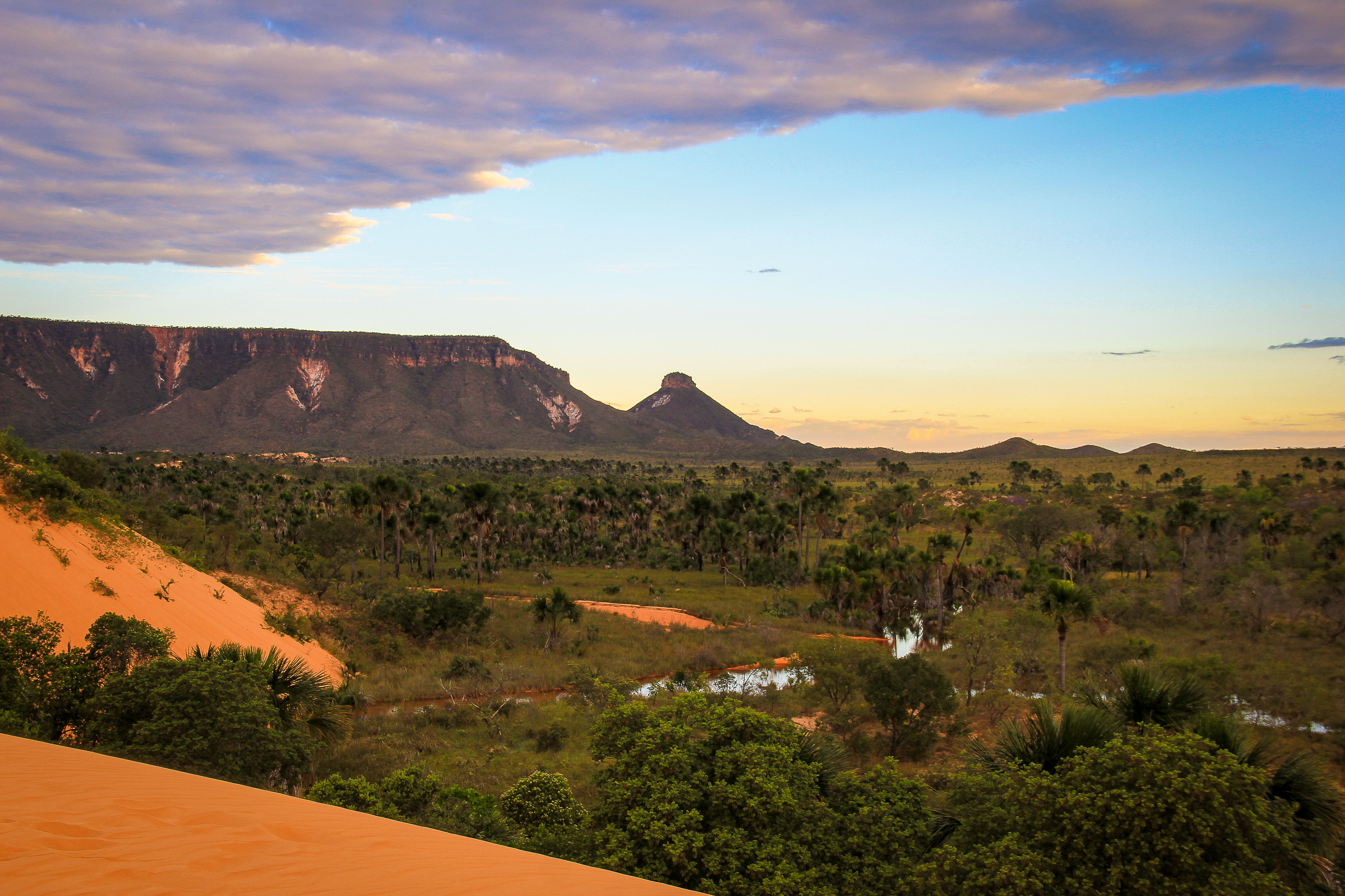 As dunas no Jalapão são formadas por meio da erosão eólica das chapadas ao seu redor. Um dos seus melhores atrativos é acompanhar o pôr do sol tocantinense.